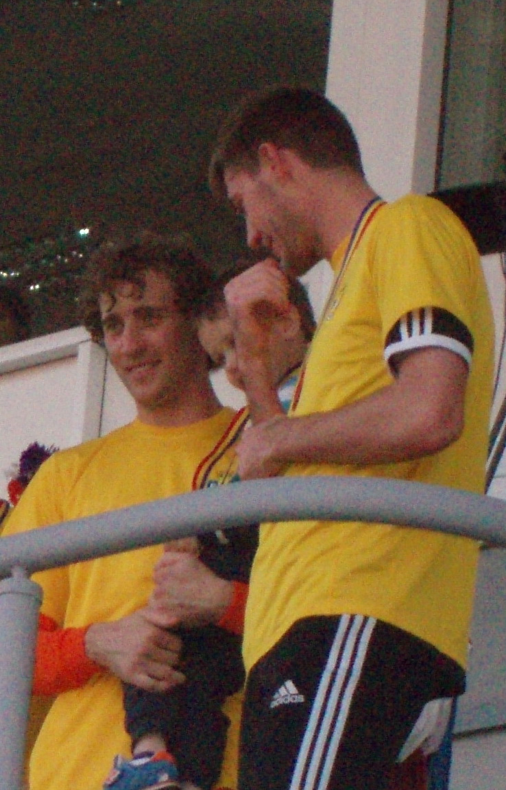 Сергей Журик